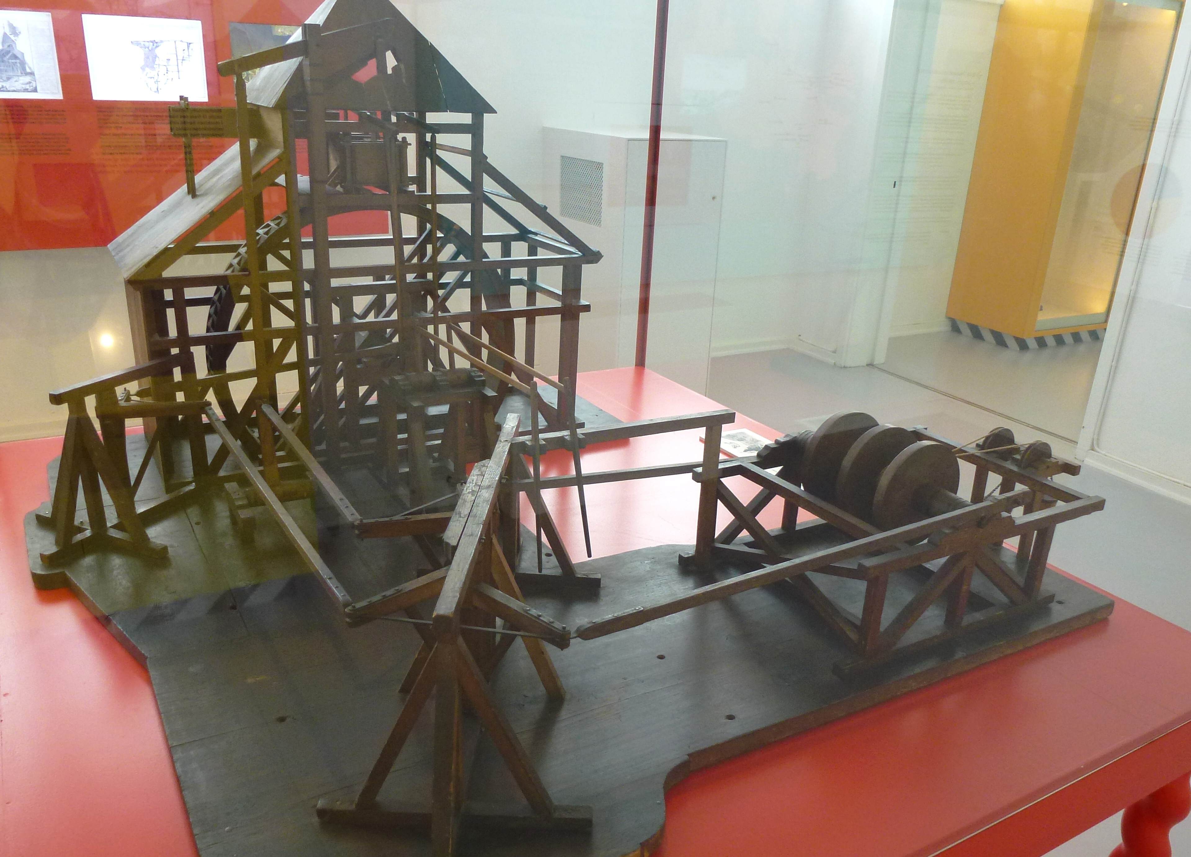 Polhemshjulet modell i Tekniska museet Stockholm